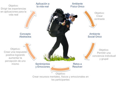 Metodología usada por Outward Bound México para la educación experiencial.